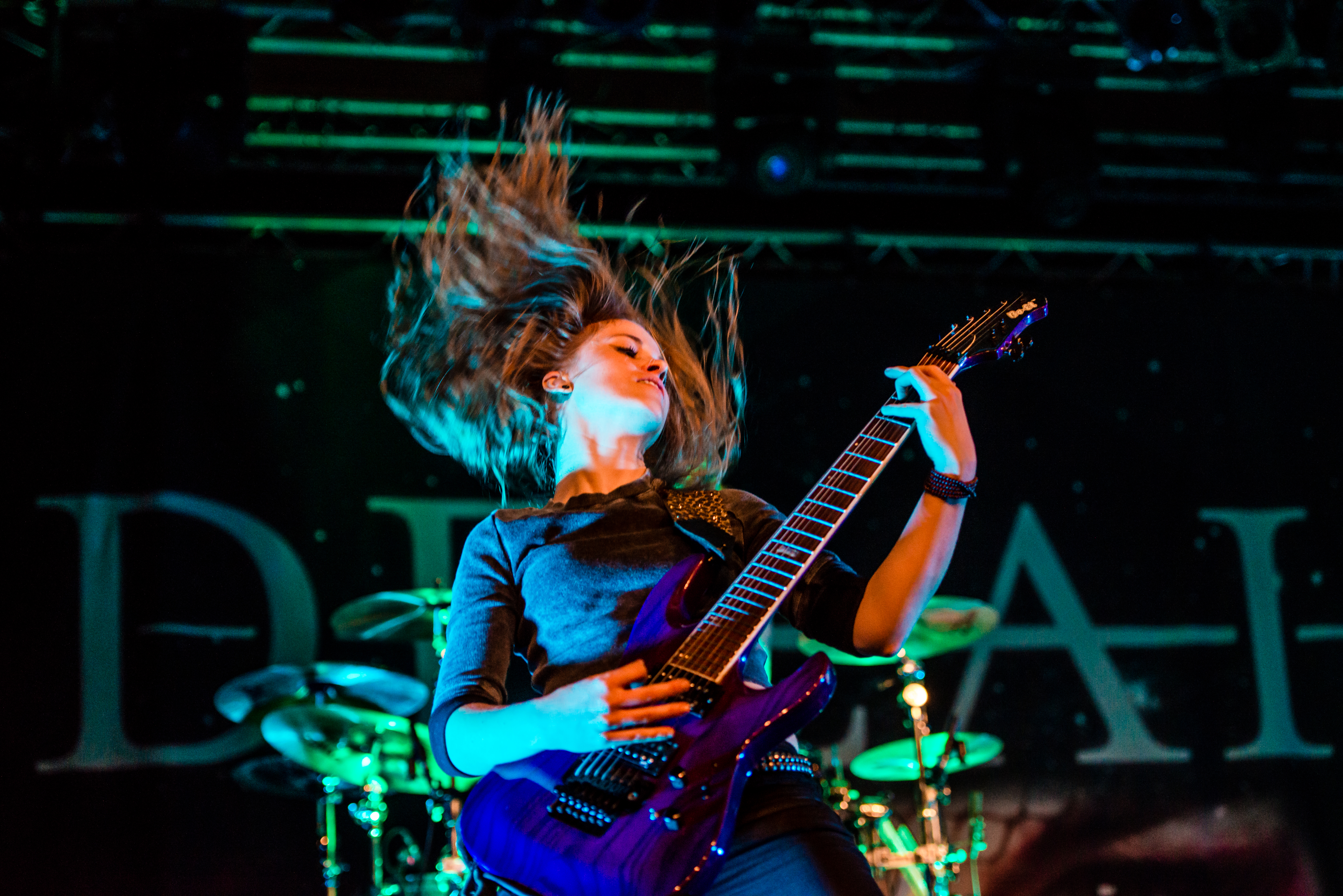 'Delain - Epic Metal Fest - Eindhoven'